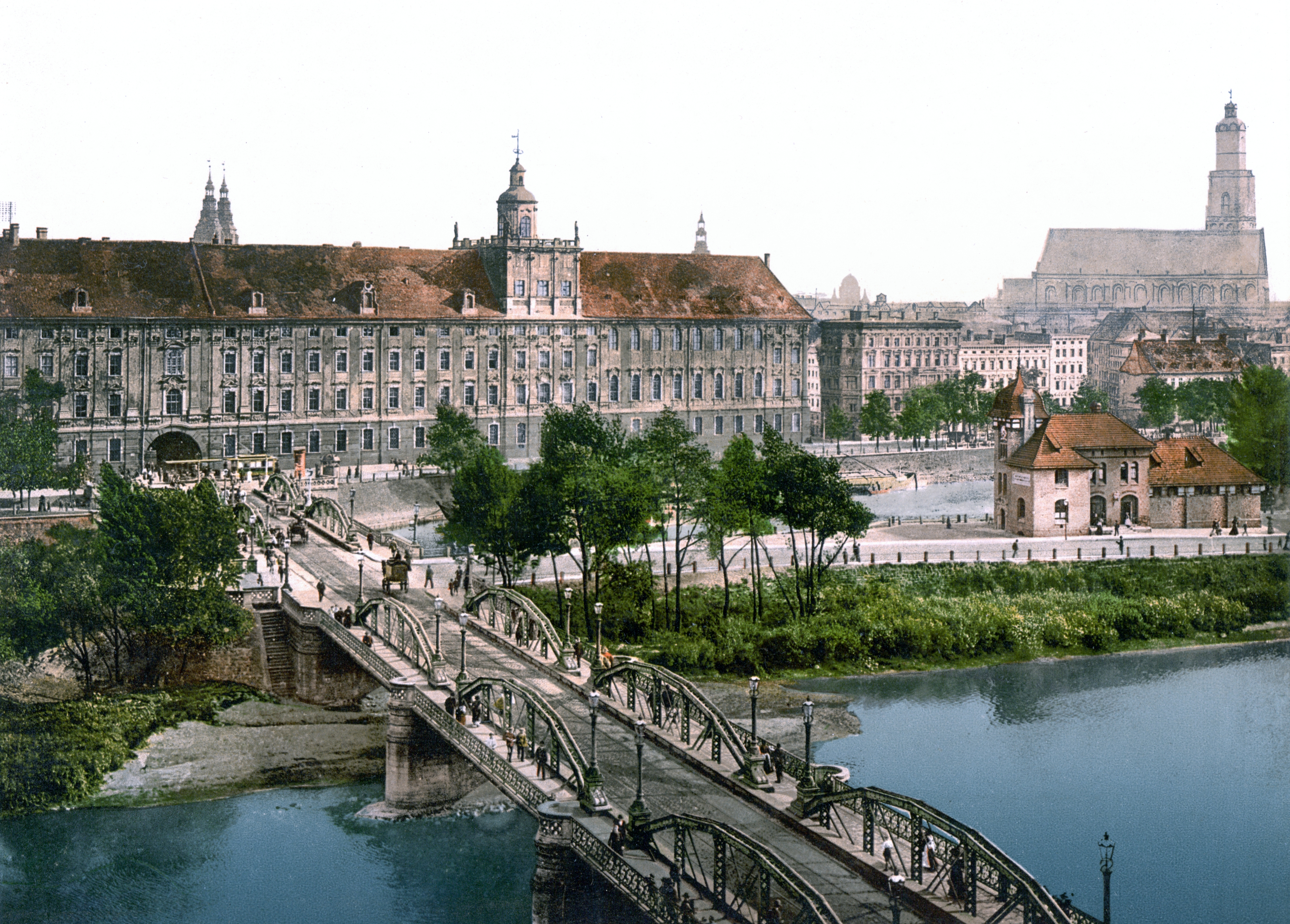 Breslau, Universitätsbrücke mit Universität, zwischen 1890 und 1900